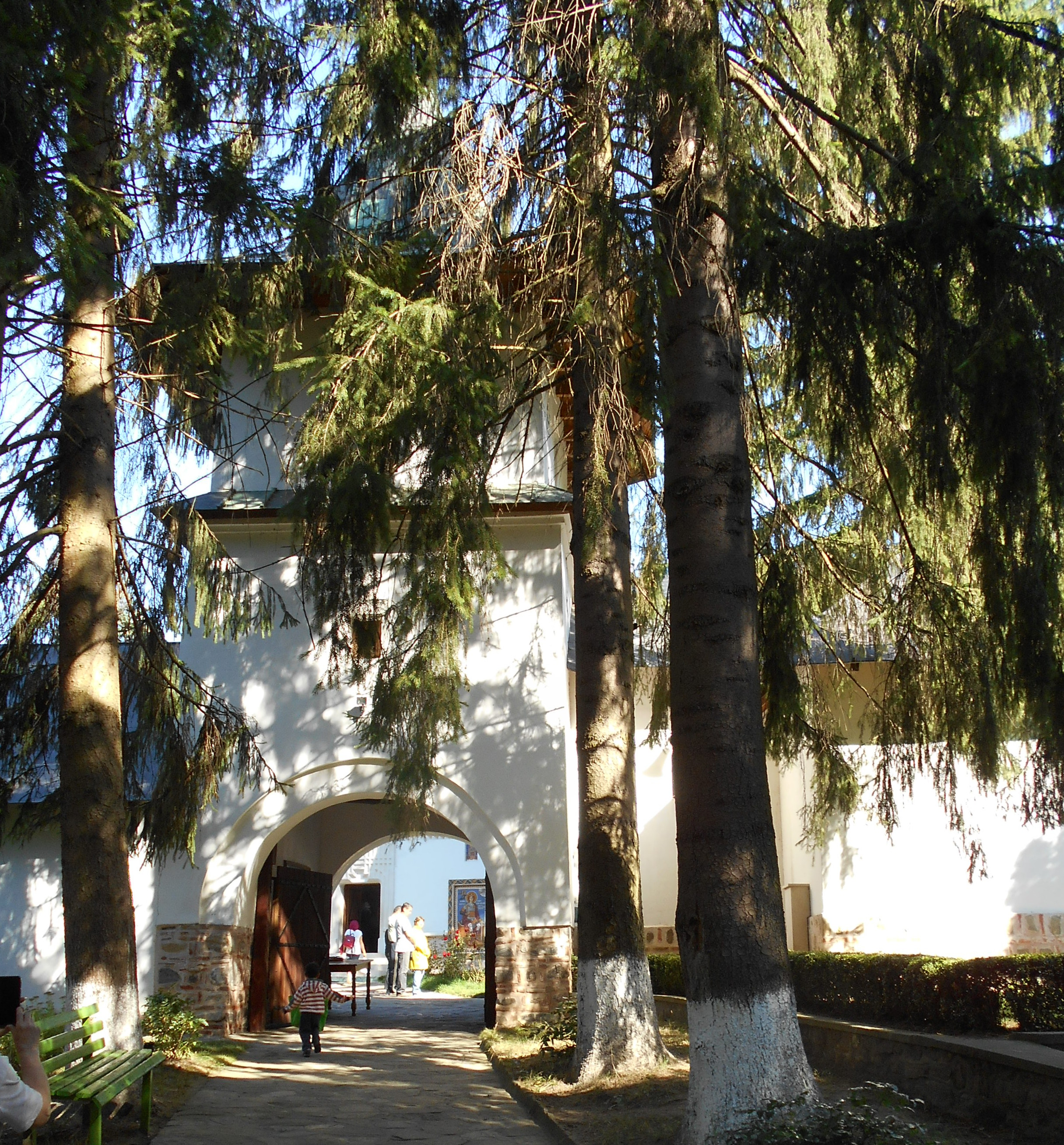 Manastirea Robaia - clopotnita 04